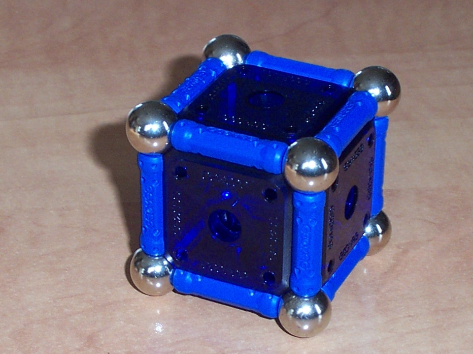 Photographie prise le 9 septembre 2007 par Utilisateur:Wyll avec un appareil photo numérique Kodak DX3600 puis coupée avec The Gimp 2.2.